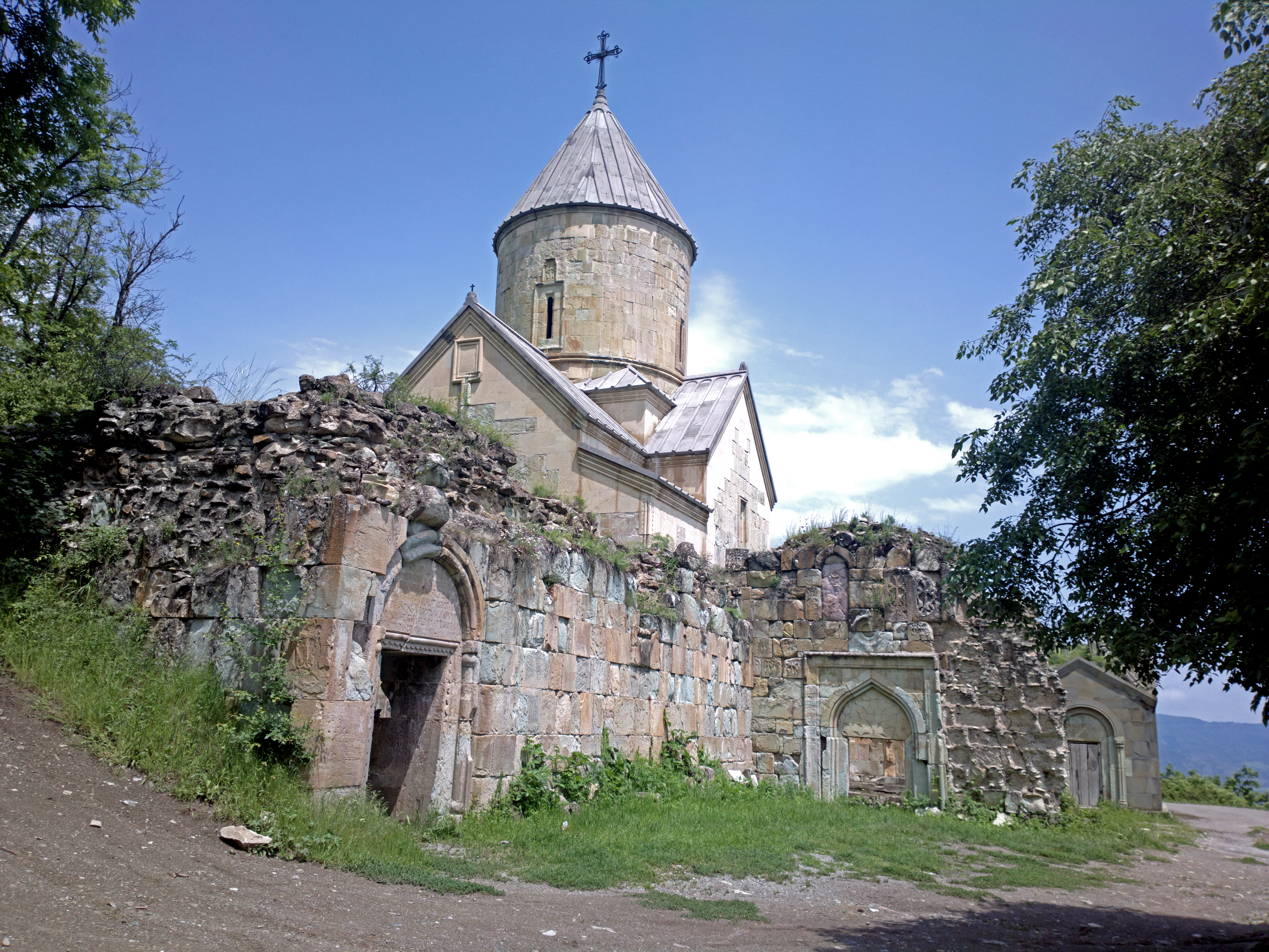 Վանական Համալիր Նոր Վարագավանք (Անապատ) 60/10